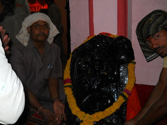 God